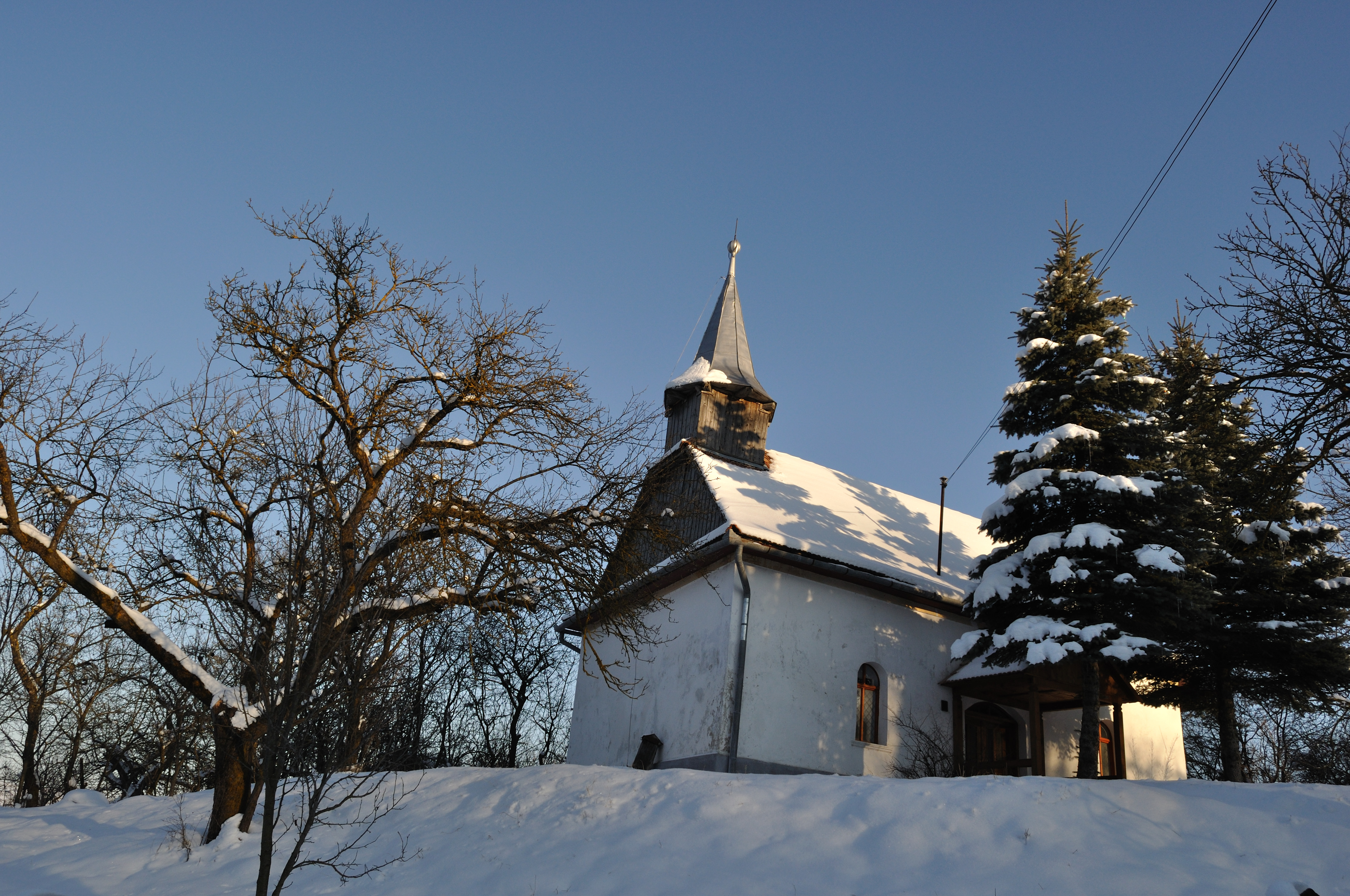 Unitarian church in Comsești/Komjátszeg, Romania (near Turda/Torda)